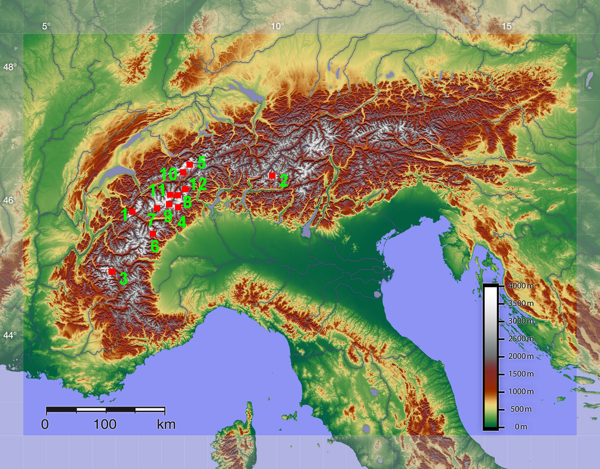 Die dominantesten (D in Kilometer) und mit der höchsten Schartenhöhe (S in Meter) ausgestatteten Viertausender der Alpen. (1-10 nach Dominanz aufgenommen, 11-12 nach Schartenhöhe ausgewählt (Beide unter den 10 höchsten Schartenhöhen die einzigen, die nach Dominanz nicht aufgenommen waren)) 1 Mont Blanc (D=2.812/ S=4.697), 2 Piz Bernina (D=138/ S=2.234), 3 Barre des Écrins (D=107,3/ S=2.043), 4 Dufourspitze (D=78,3/ S=2.165), 5 Finsteraarhorn (D=51,7/ S=2.280), 6 Gran Paradiso (D=45,1/ S=1.879), 7 Grand Combin (D=26,5/ S=1.517), 8 Dom (D=16,9/ S=1.046), 9 Matterhorn (D=13,9/ S=1.027), 10 Aletschhorn (D=13,5/ S=1.017), 11 Weisshorn (D=11,1/ S=1.189), 12 Weissmies (D=11,2/ S=1.179)